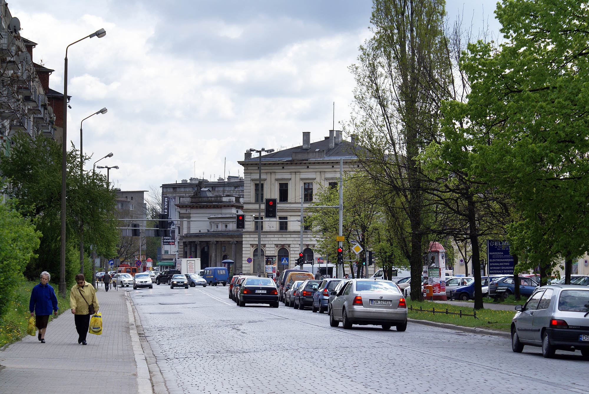 Wrocław, Dworzec Świebodzki, 1842, 1873